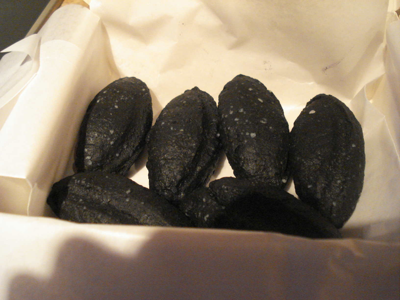 Quenelle à l'encre de seiche de chez Giraudet aux Halles de Lyon)